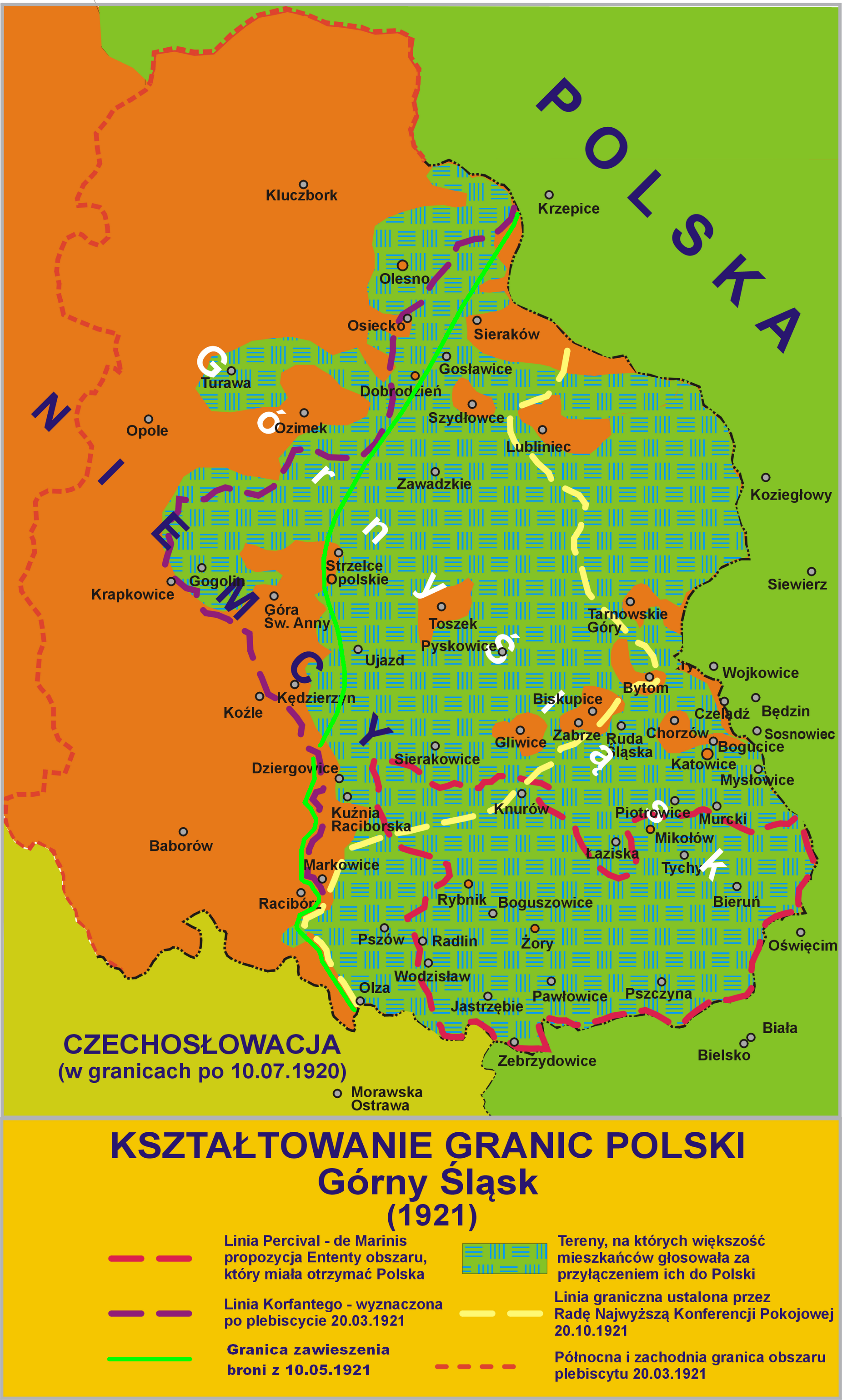 Kształtowanie granic Polski - Górny Śląski - (1921)